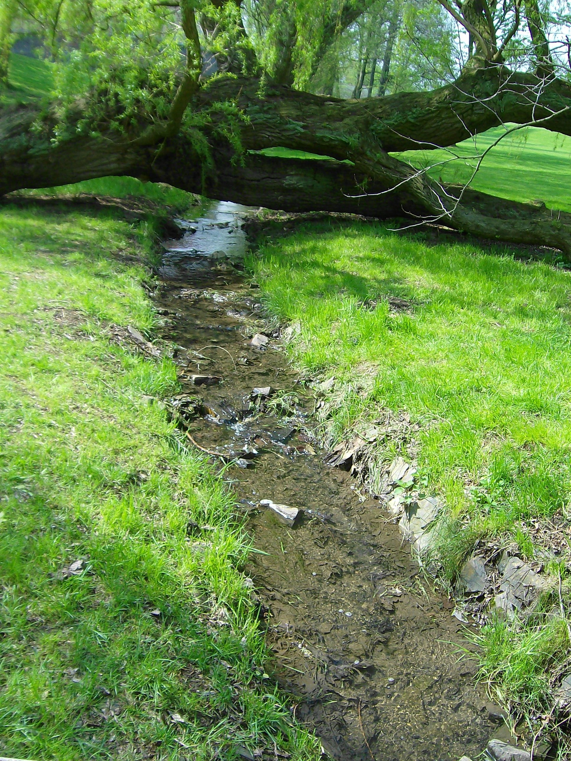 Zámek Ctěnice